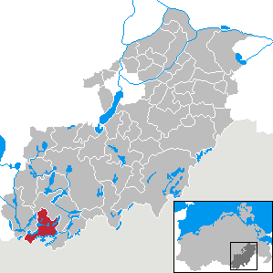 Wustrow in Mecklenburg-Vorpommern, Landkreis Mecklenburg-Strelitz